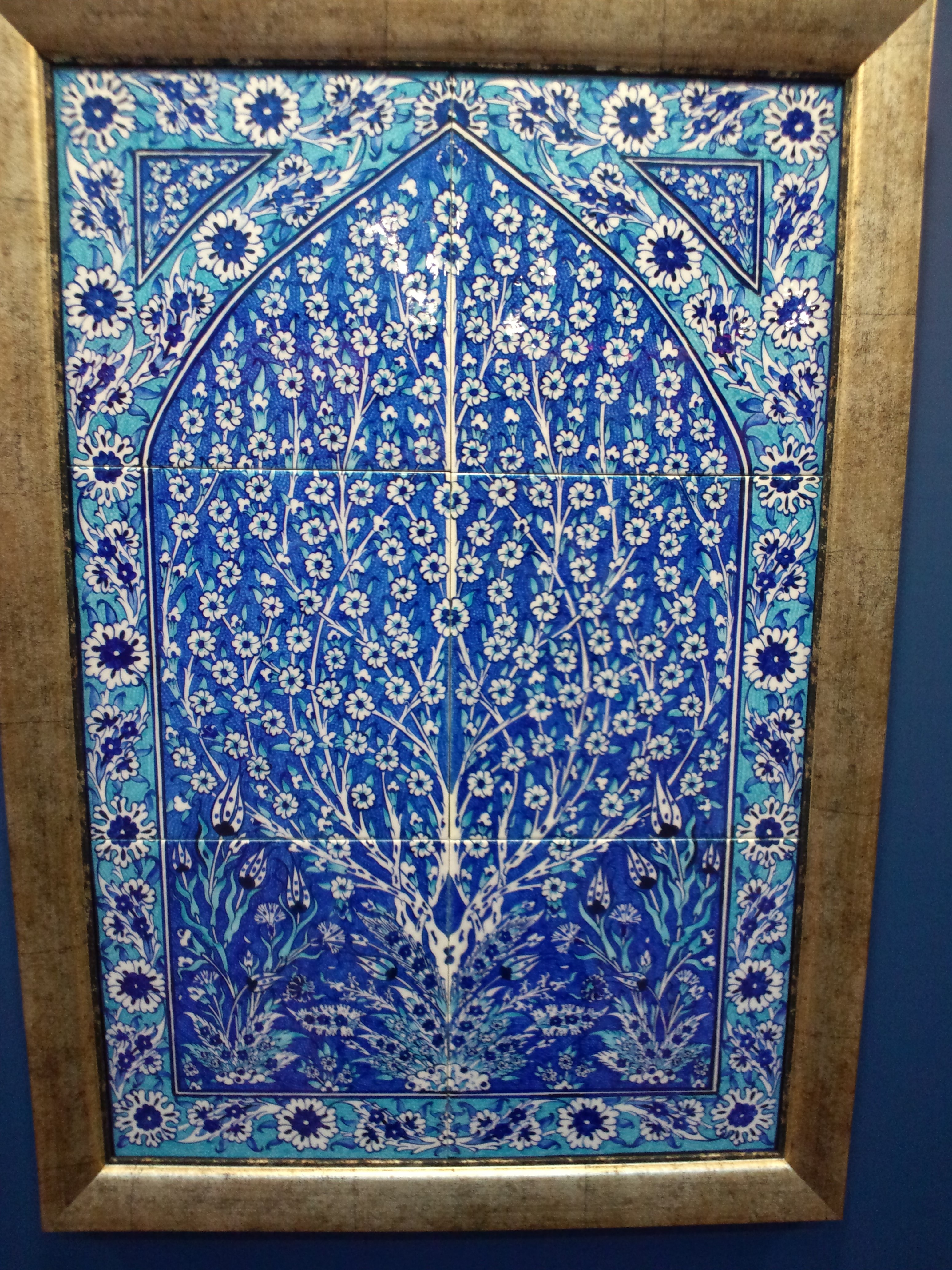 リトルワールド エキゾチックトルコ文化展 トルコのタイル芸術（イズニック）